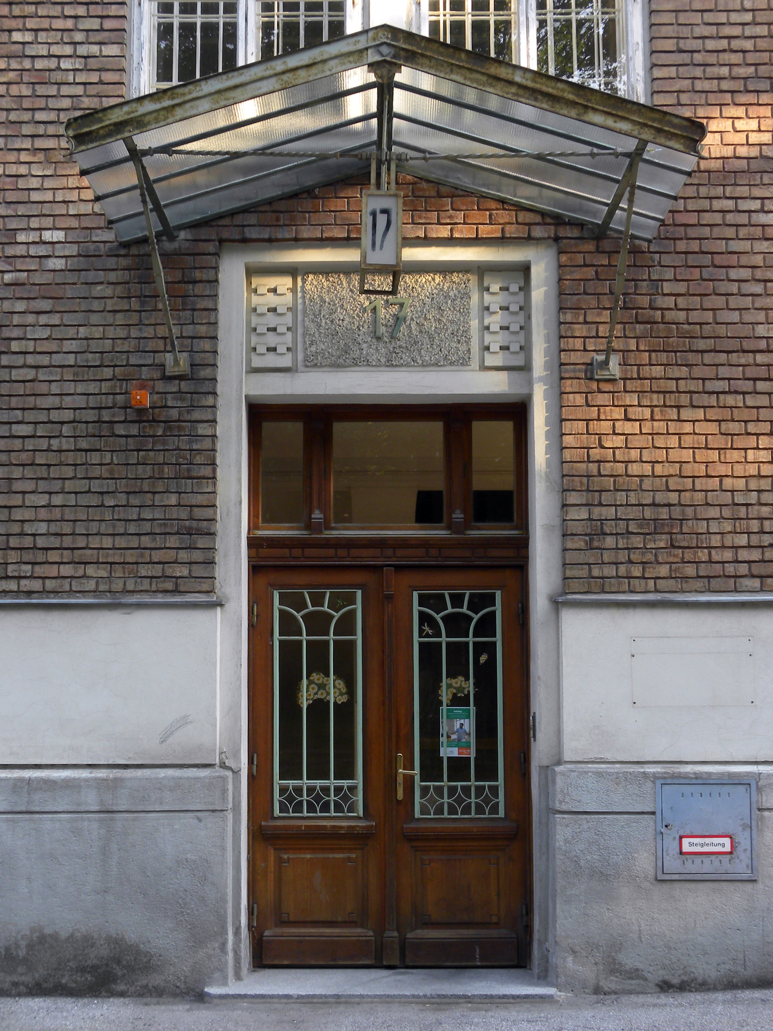 Der Pavillon 17 des psychiatrischen Krankenhauses Baumgartner Höhe ist derzeit dem Otto-Wagner-Pflegezentrum zugeordnet und beherbergt das Zentrum für Förderpädagogik. Die Verwendung der Pavillons, insbesondere im mittleren Bereich, war im Lauf der Geschichte jedoch sehr wechselvoll. In der Zeit des NS-Regimes standen die Pavillons 15 und 17 ab 1940 in Verwendung der "Jugendfürsorgeanstalt Am Spiegelgrund", von 1942-45 als "Städtische Nervenklinik für Kinder Am Spiegelgrund", welche eine der insgesamt mehr als dreißig sog. Kinderfachabteilungen im ehem. Deutschen Reich war. Etwa 700 bis 800 Euthanasiemorde an verhaltensauffälligen und geistig behinderten Kindern fanden während dieser Zeit in der Anstalt unter der Leitung von Heinrich Gross statt, unzählige weitere wurden aber auch in die Tötungsanstalt Hartheim deportiert und dort umgebracht.